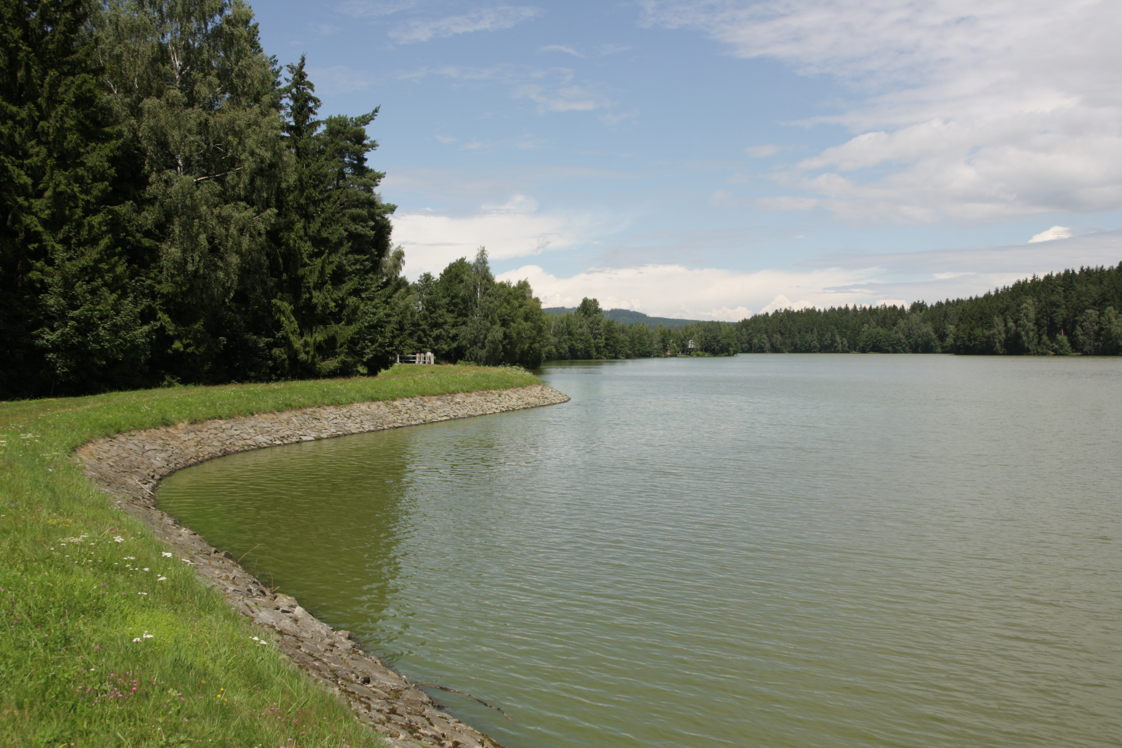 Světnov - vodní nádrž Strž, pohled od hráze.